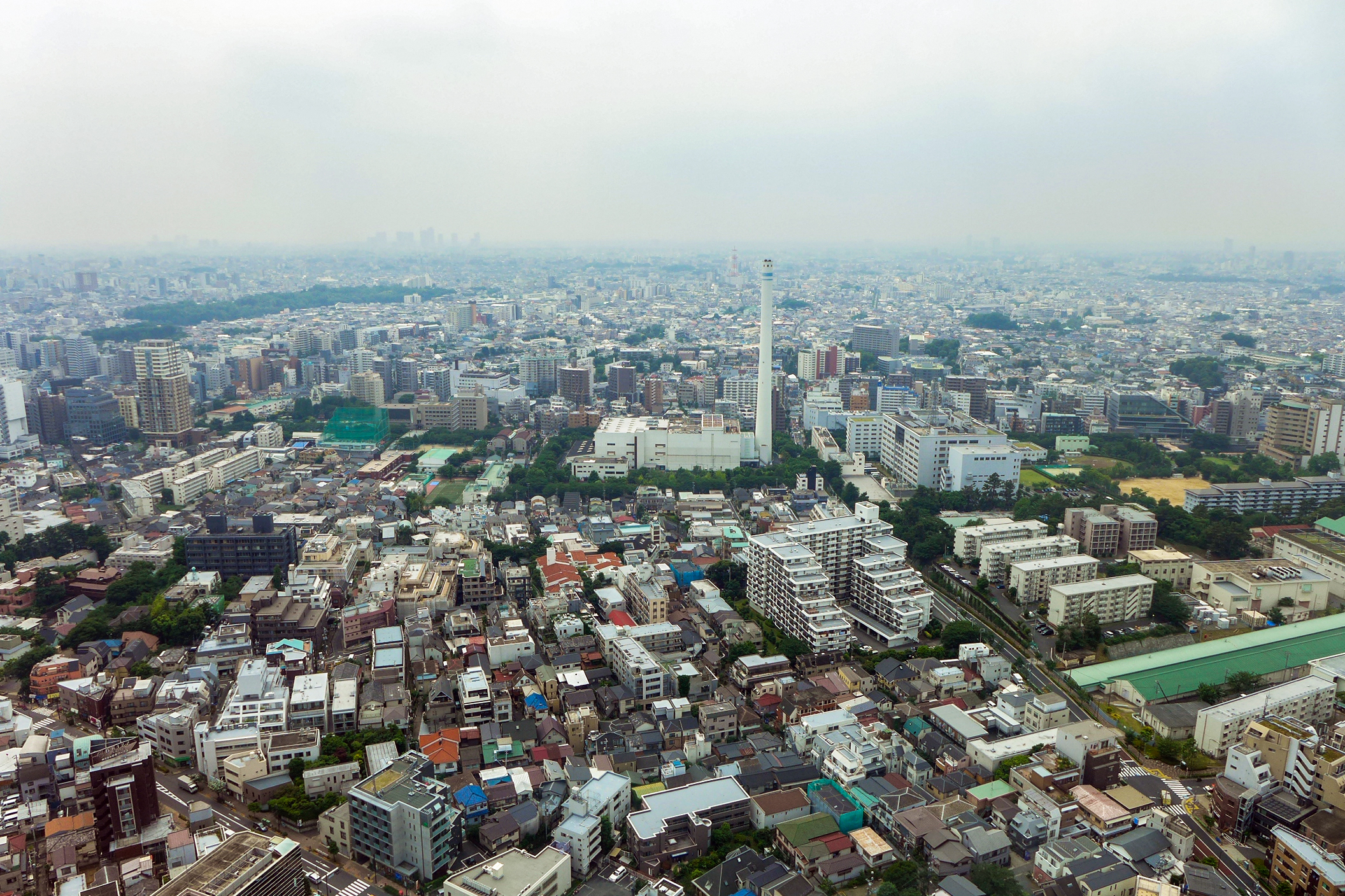 Mita, Meguro City